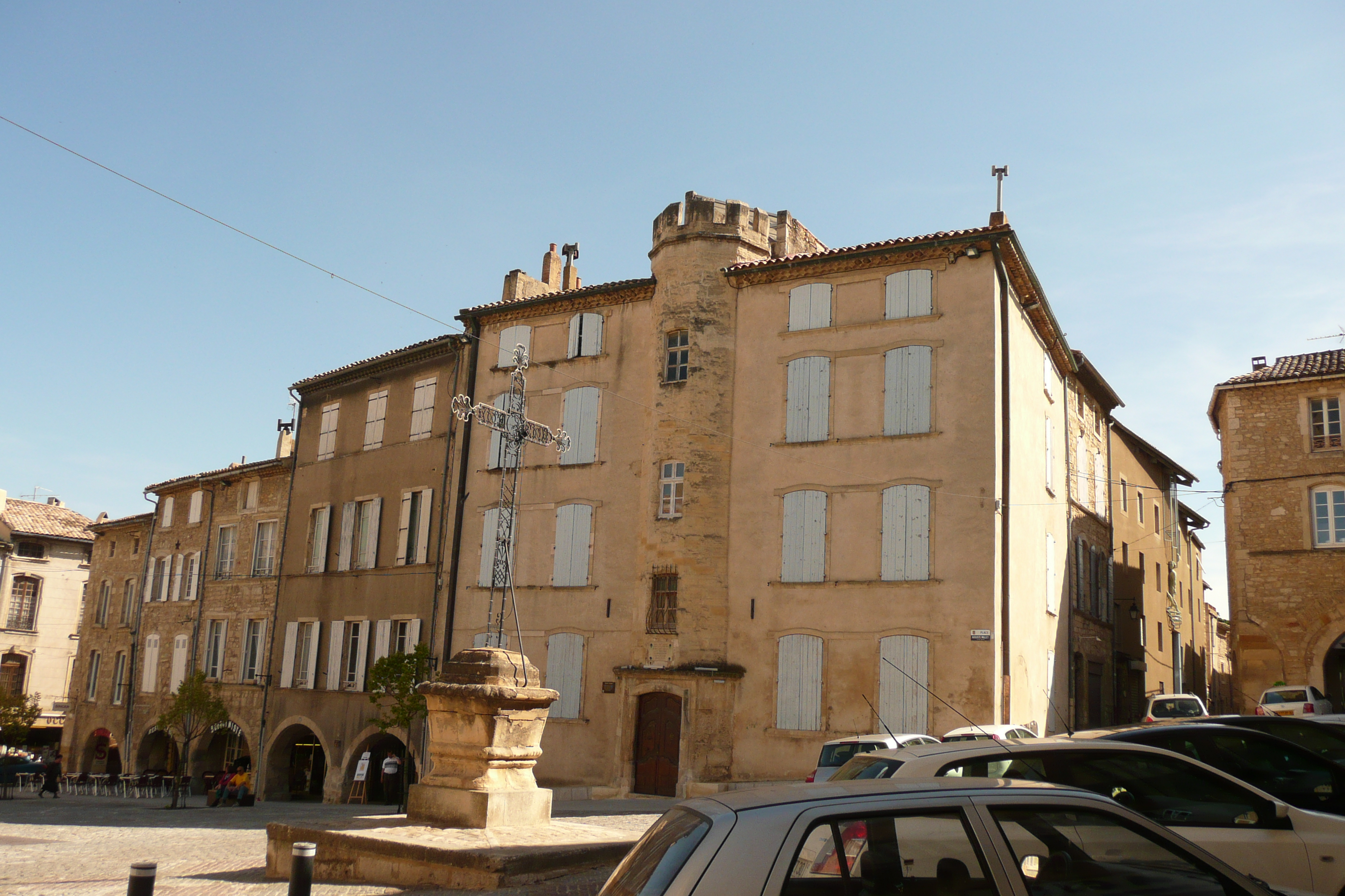 Place Mallet à Bagnols-sur-Cèze.